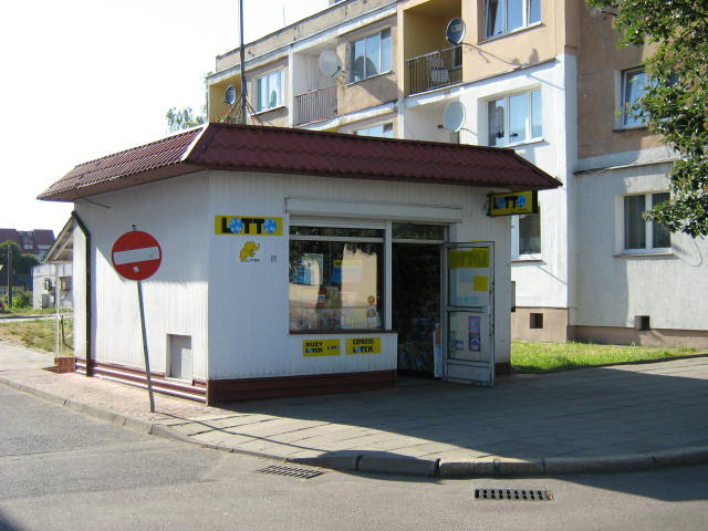 Sklep papierniczy oraz kolektura Lotto